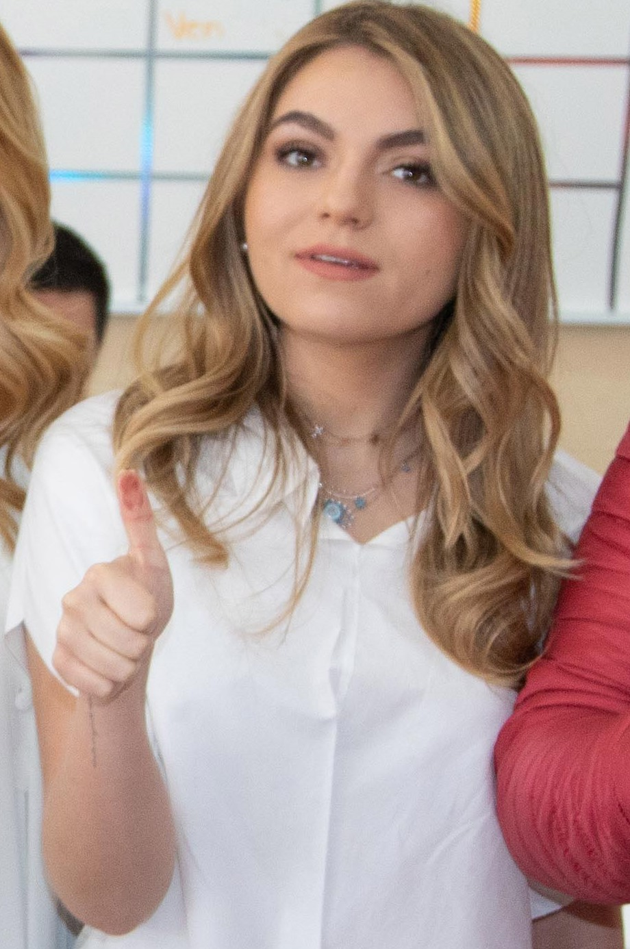 Sofía Castro en julio de 2018